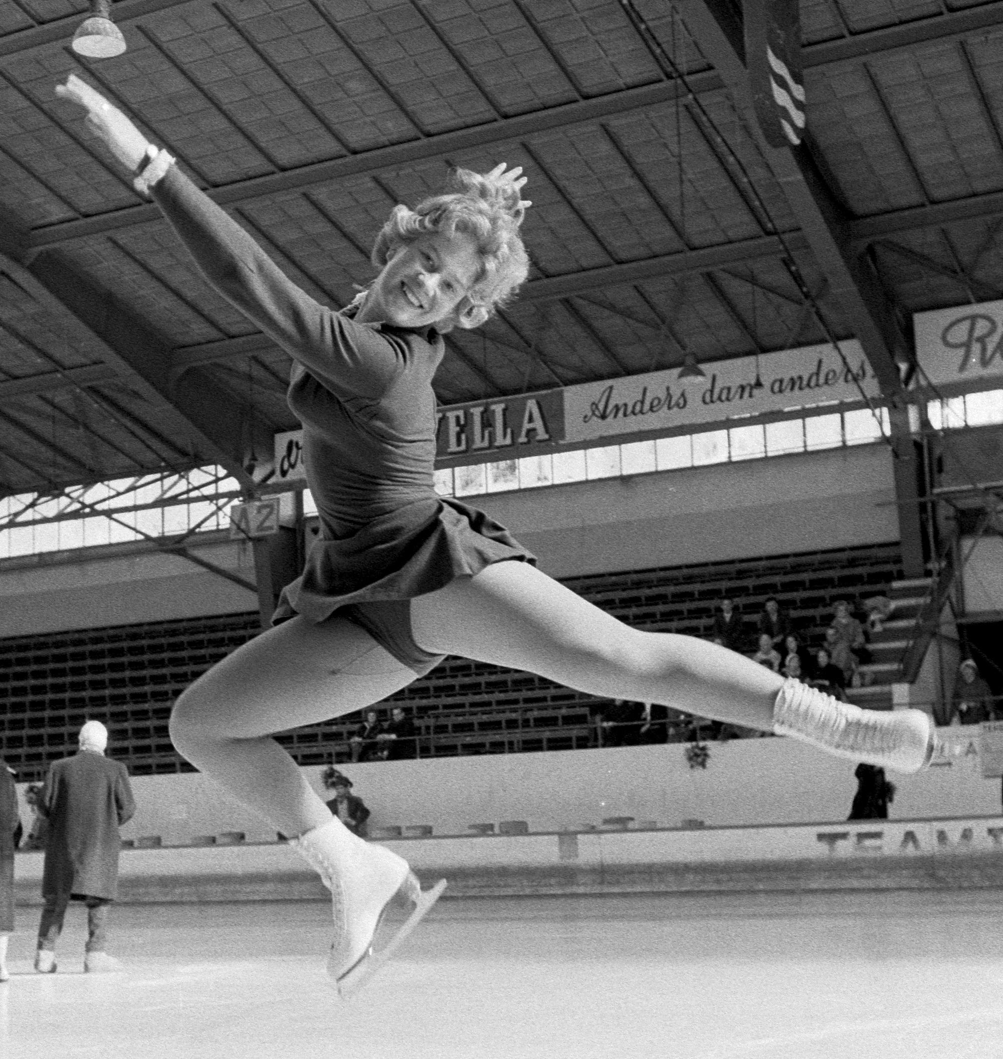 Nederlandse kampioenschappen Kunstrijden S. Dijkstra